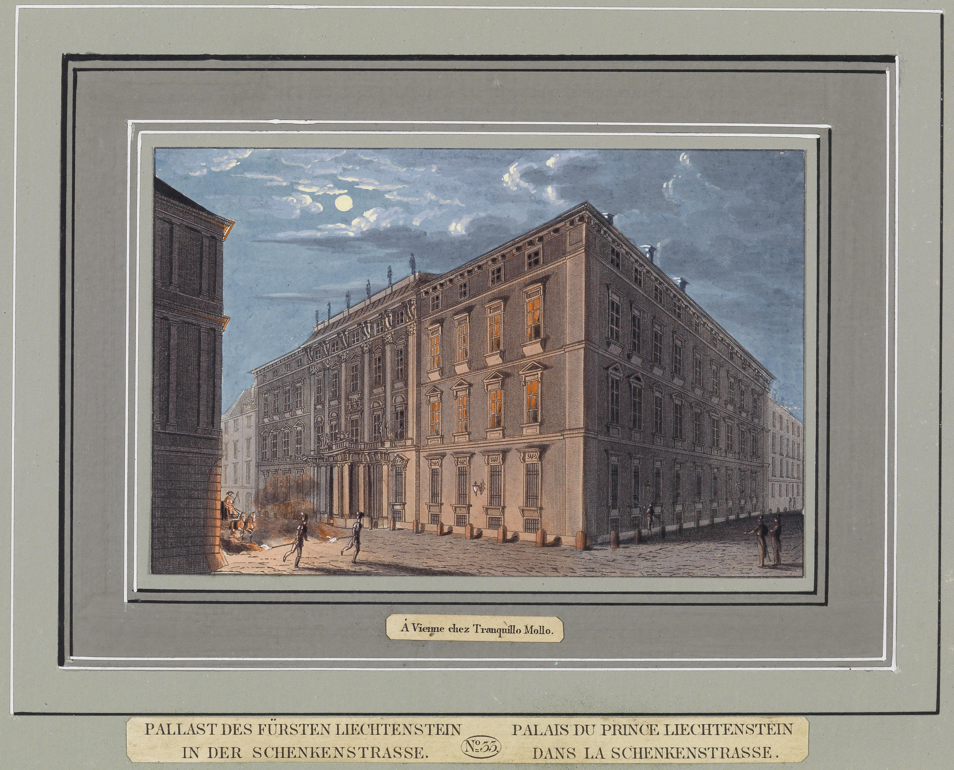 Pallast des Fürsten Liechtenstein in der Schenkenstrasse. Kolorierter Kupferstich aus T. Mollo, Wiens vorzüglichste Gebäude... (Wien 1823). Ca. 9 x 14 cm. Blatt aus der "Luxusausgabe". Blattgröße ca. 25,5 x 33,5 cm